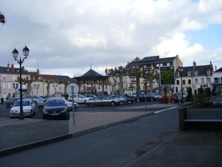 Saint-Amand-Montrond centrum (Place de la République), Cher, France, 2007